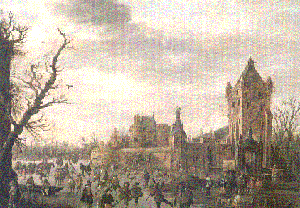 Schilderij van Jan van Goyen ca. 1630 (Kasteel Batenstein-Vianen)